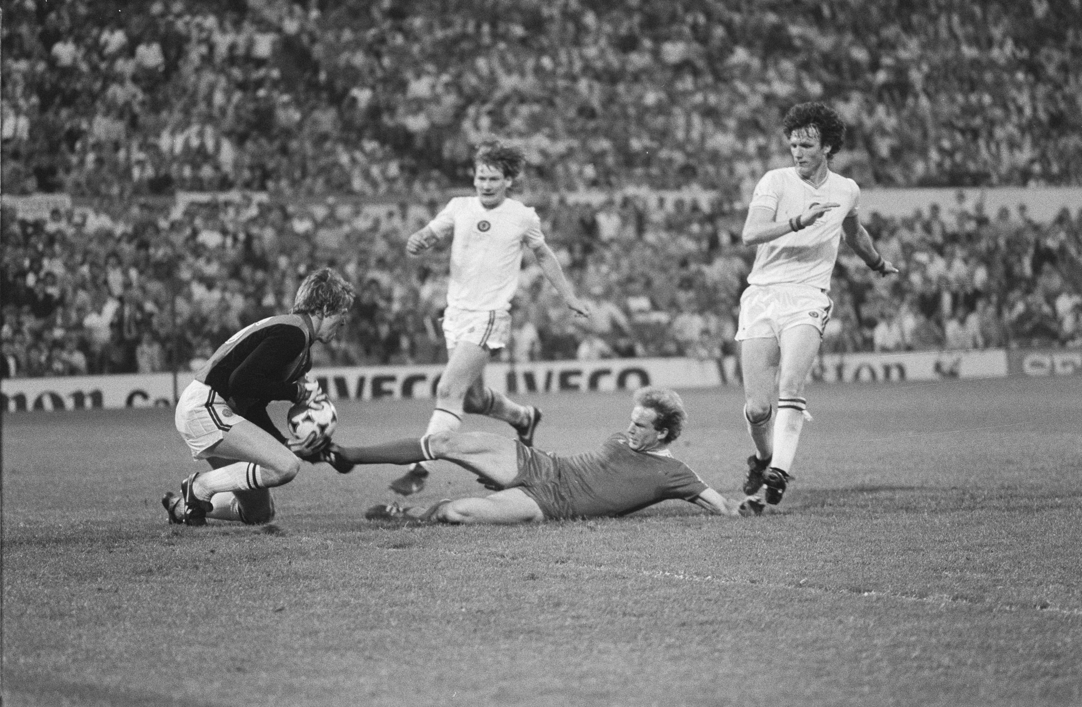 Collectie / Archief : Fotocollectie Anefo Reportage / Serie : [ onbekend ] Beschrijving : FC Bayern Munchen tegen Aston Villa 0-1 Europa Cup I Hoenest valt keeper Spink aan Datum : 26 mei 1982 Trefwoorden : sport, voetbal Persoonsnaam : Aston Villa, FC Bayern Munchen Fotograaf : Antonisse, Marcel / Anefo Auteursrechthebbende : Nationaal Archief Materiaalsoort : Negatief (zwart/wit) Nummer archiefinventaris : bekijk toegang 2.24.01.05 Bestanddeelnummer : 934-7232